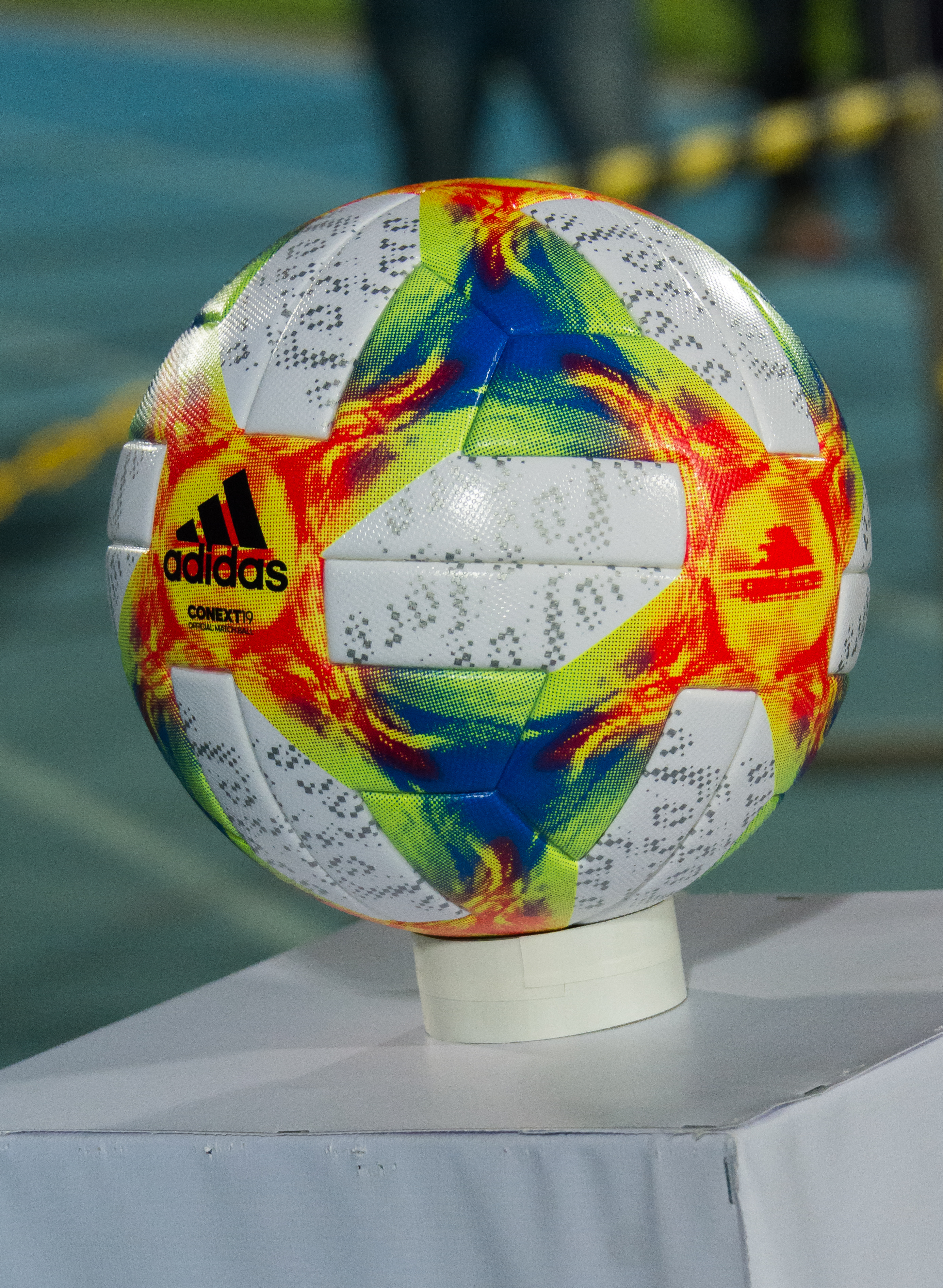 Balón Adidas Conext 19, Chile v Colombia, Estadio Nacional, Ñuñoa, Santiago, Chile.